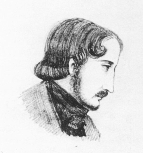 Theodor Althaus auf einer Zeichnung von Malwida von Meysenbug